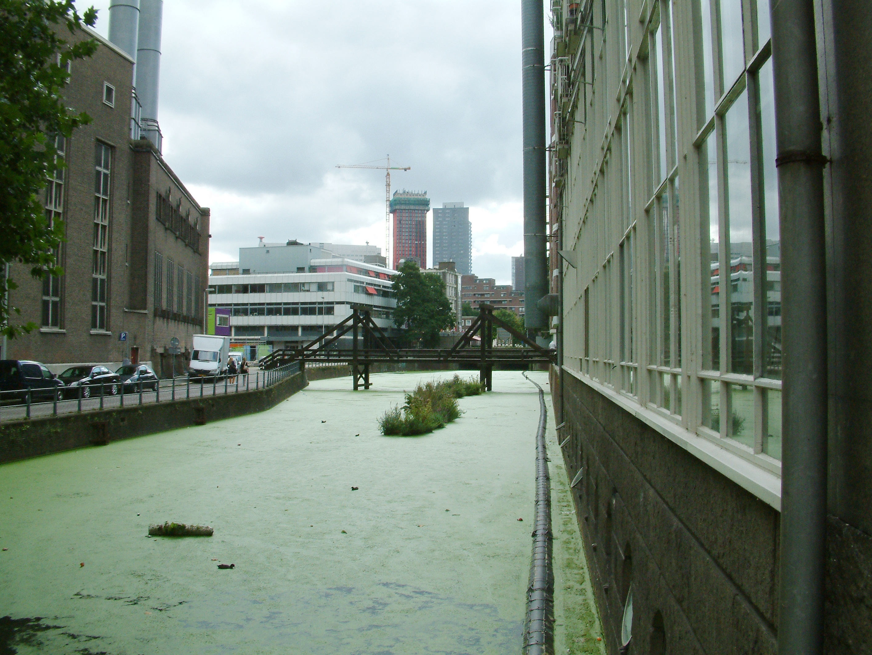 Bruggen over de Rotte, De Krattenbrug, noordkant